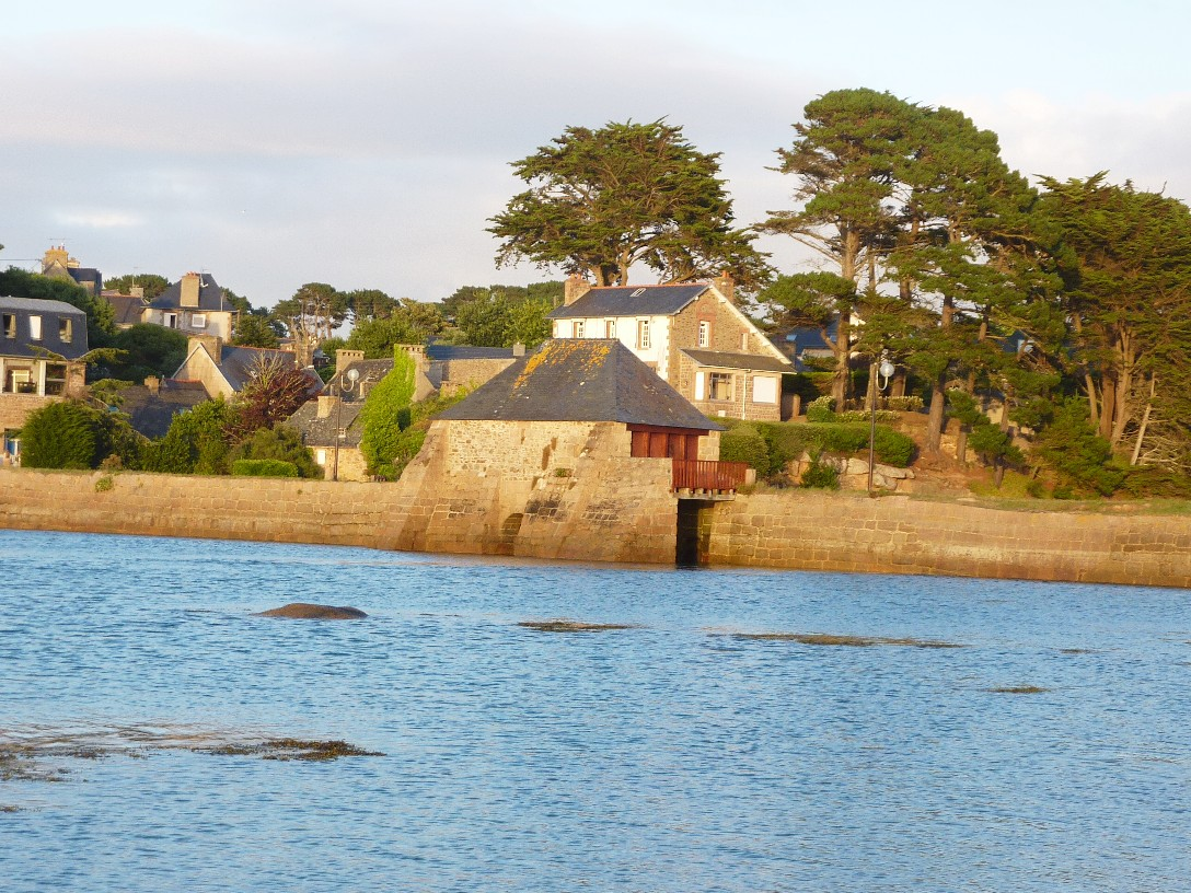 l'actuel moulin à marée du petit Traouéro à Ploumanac'h; Vue côté du port; La retenue d'eau se trouve derrière la digue.